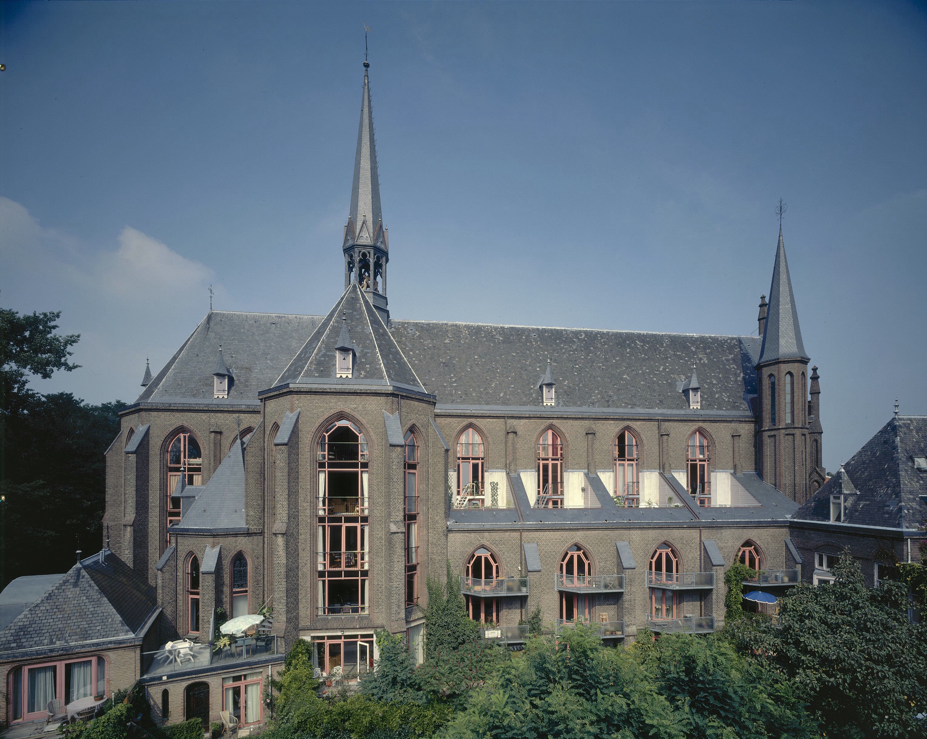 Voormalige Rooms-Katholieke Sint Martinuskerk: Overzicht noordgevel van voormalige kerk, thans appartementencomplex